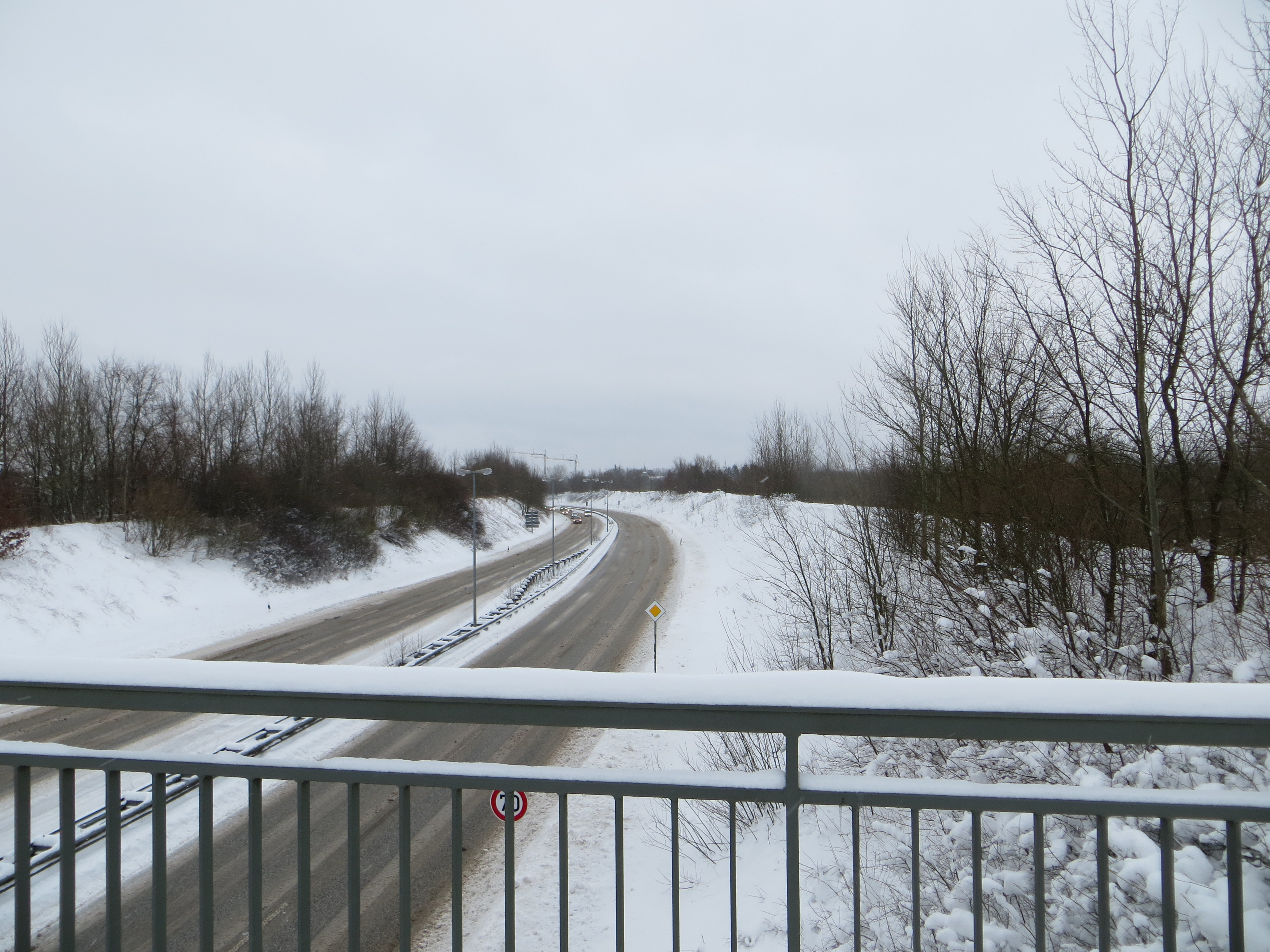 Osttangente während der Kältewelle 2018 bei Sünderup